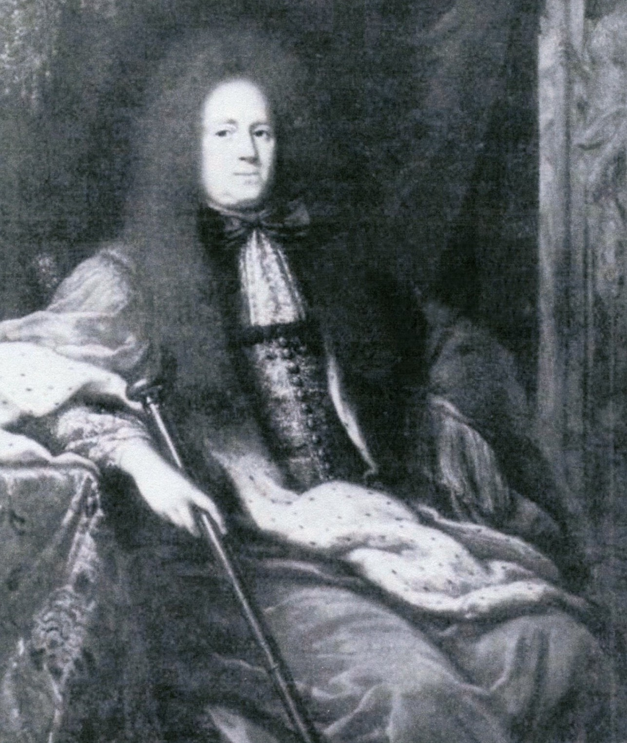 Johan Gabriel Stenbock (1640-1705)